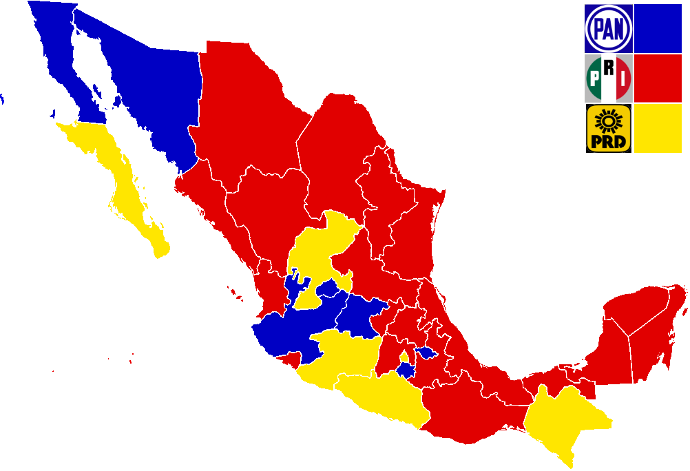 Kaart van de Staten van Mexico met de politieke partij van de gouverneurs aangegeven, zelf gemaakt